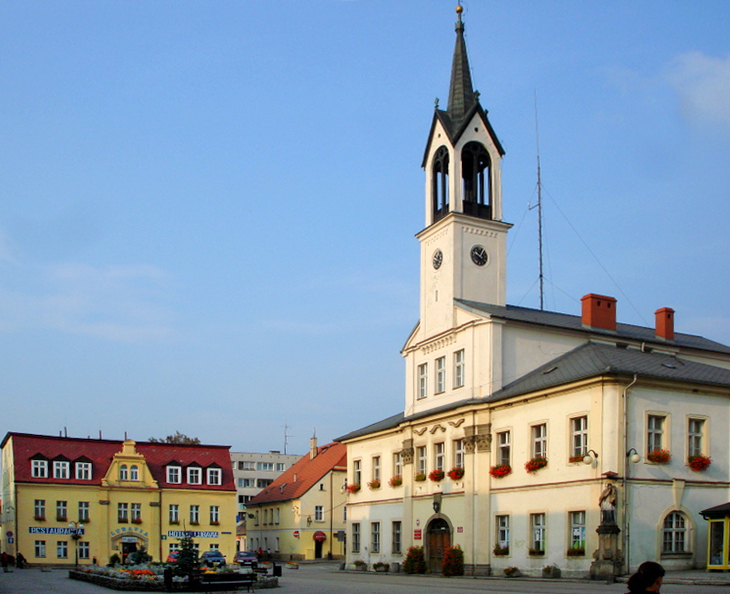 Lubawka, ratusz, 1726, XIX